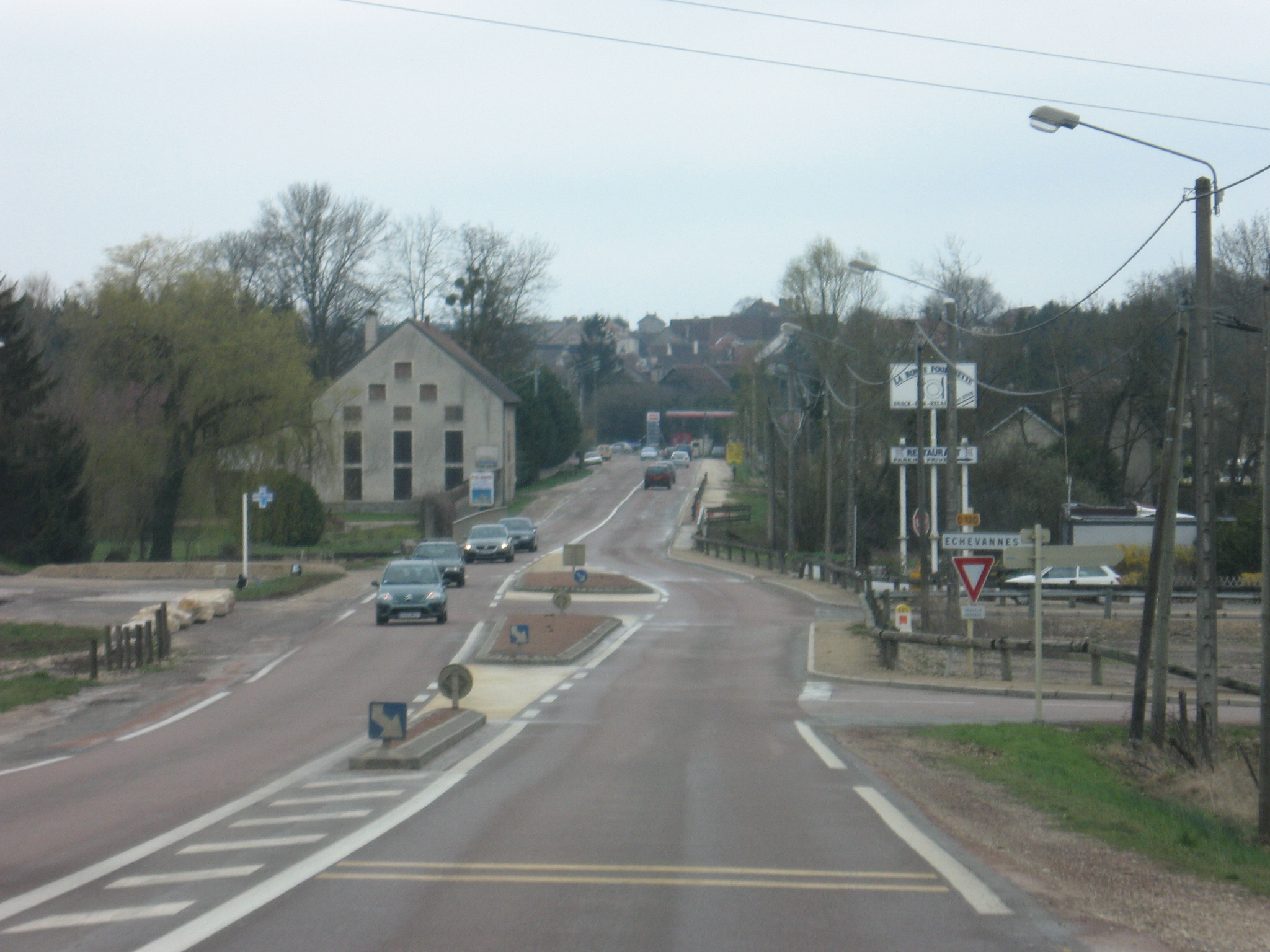 Til-Châtel (Côte-d'Or)